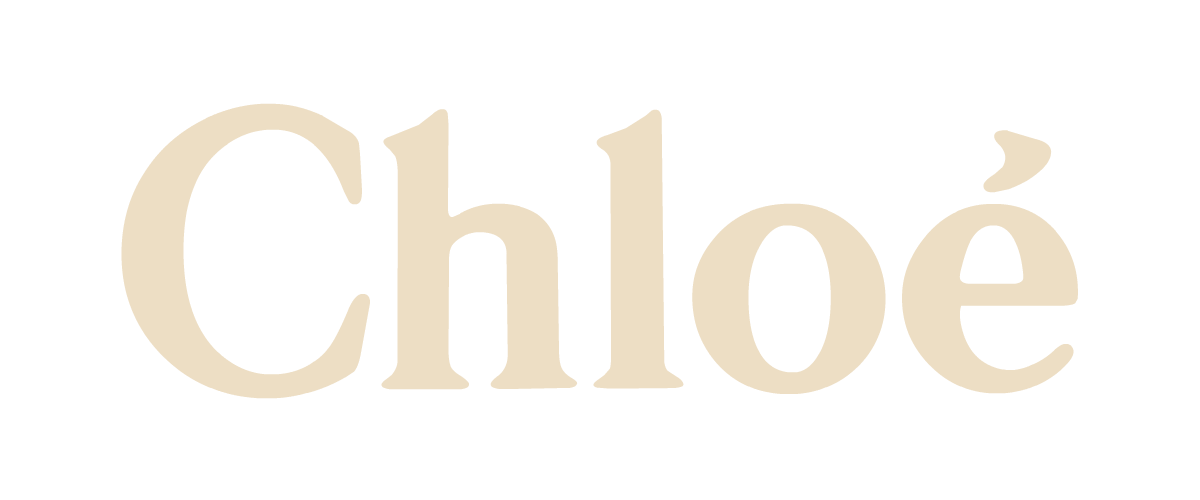 Logotipo de la casa de modas francesa Chloé.